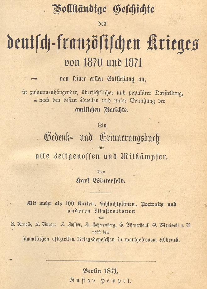 Geschichte des deutsch-französischen Krieges, Berlin 1871 (Titelseite)